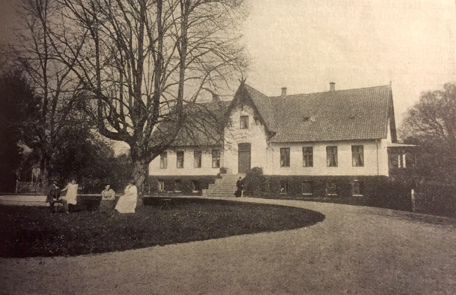 Hovedbygningen på Borupgaard ca. 1900